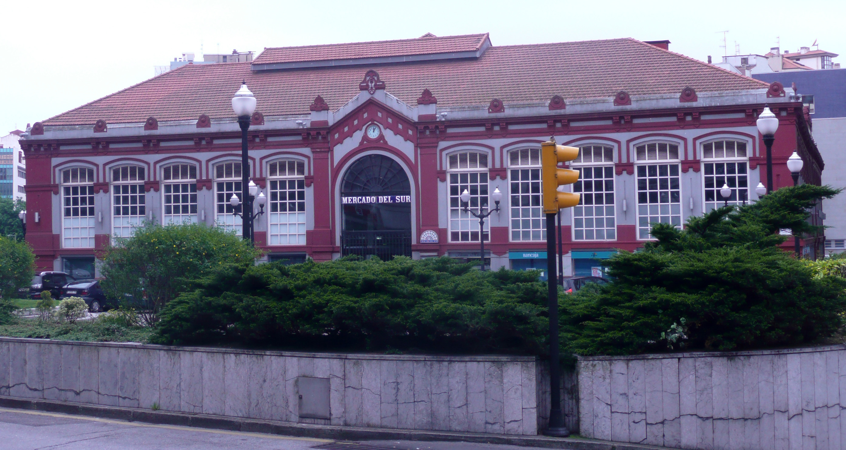 Mercado del Sur, Gijón (Asturias)